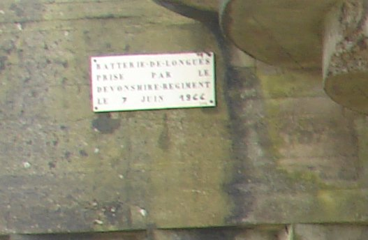 Placa comemorativa da tomada da bateria de Longues Sur mer pelo Regimento Devonshire, Britânico em 07 de junho de 1944